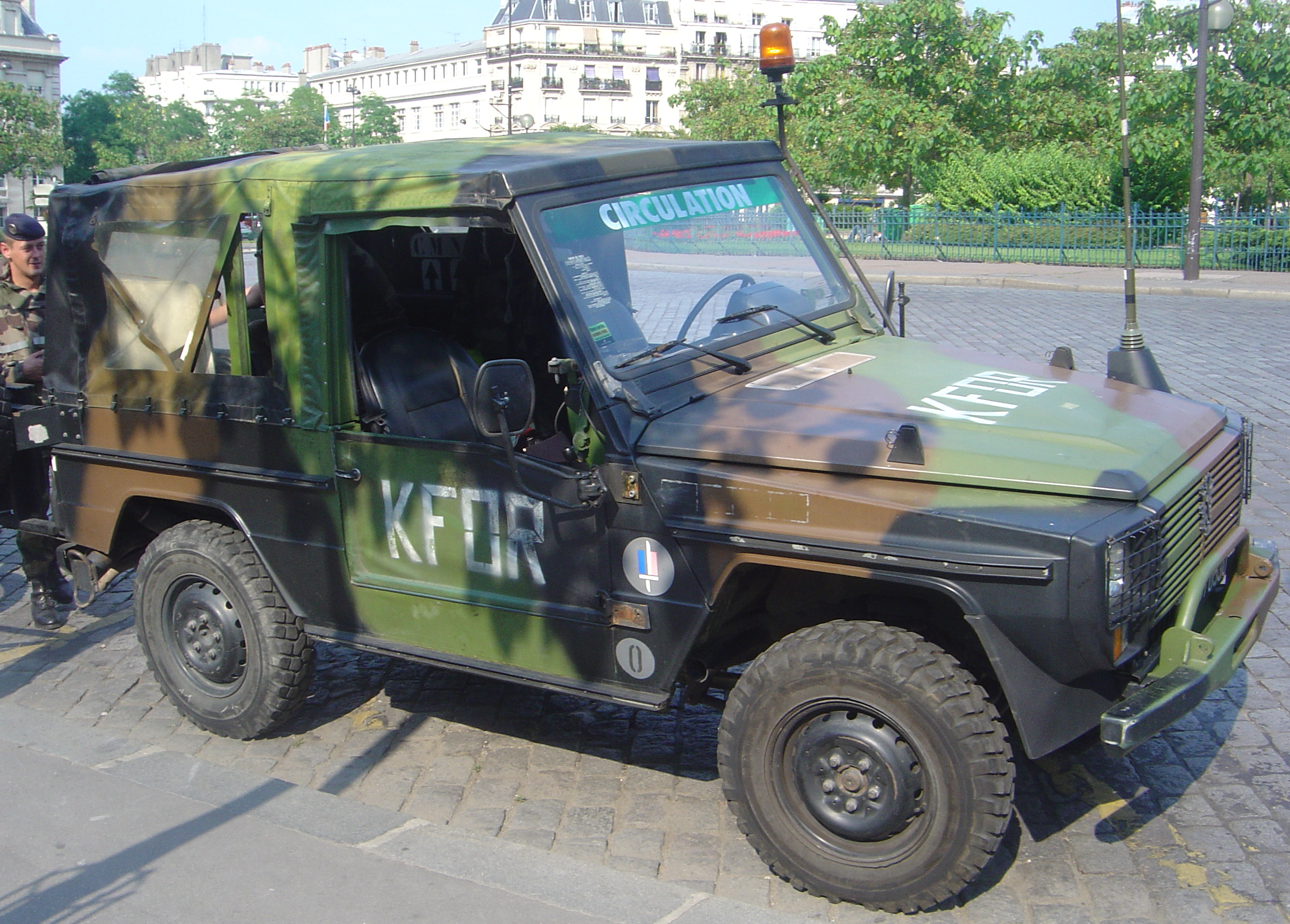 French Peugeot P4